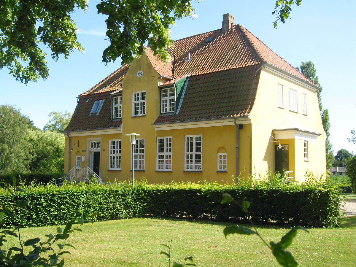 Bygningerne i Annebergparken